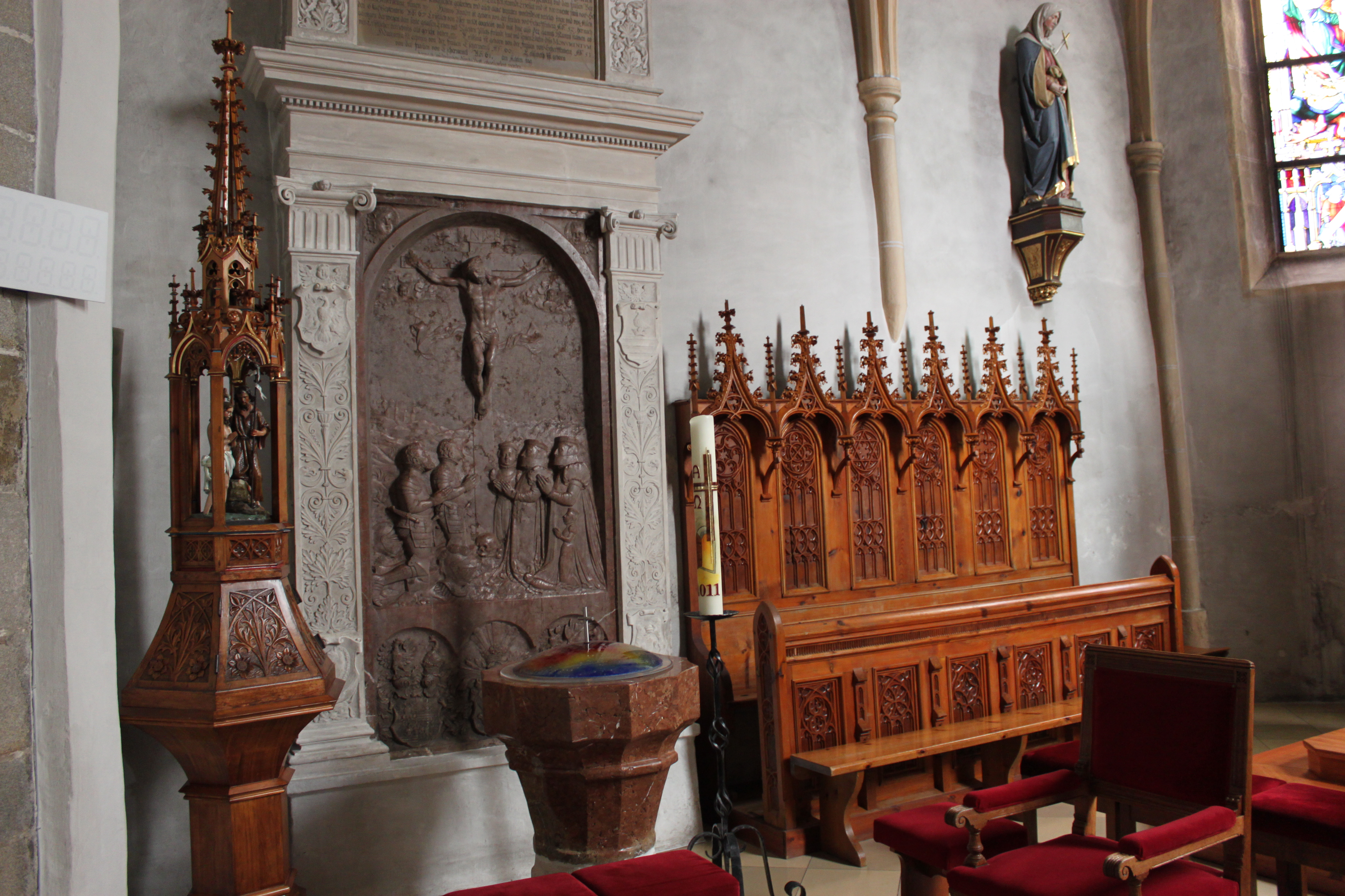 Taufbecken und Chorgestühl der Pfarrkirche St. Jakobus d. Ä. in Zeillern, Niederösterreich